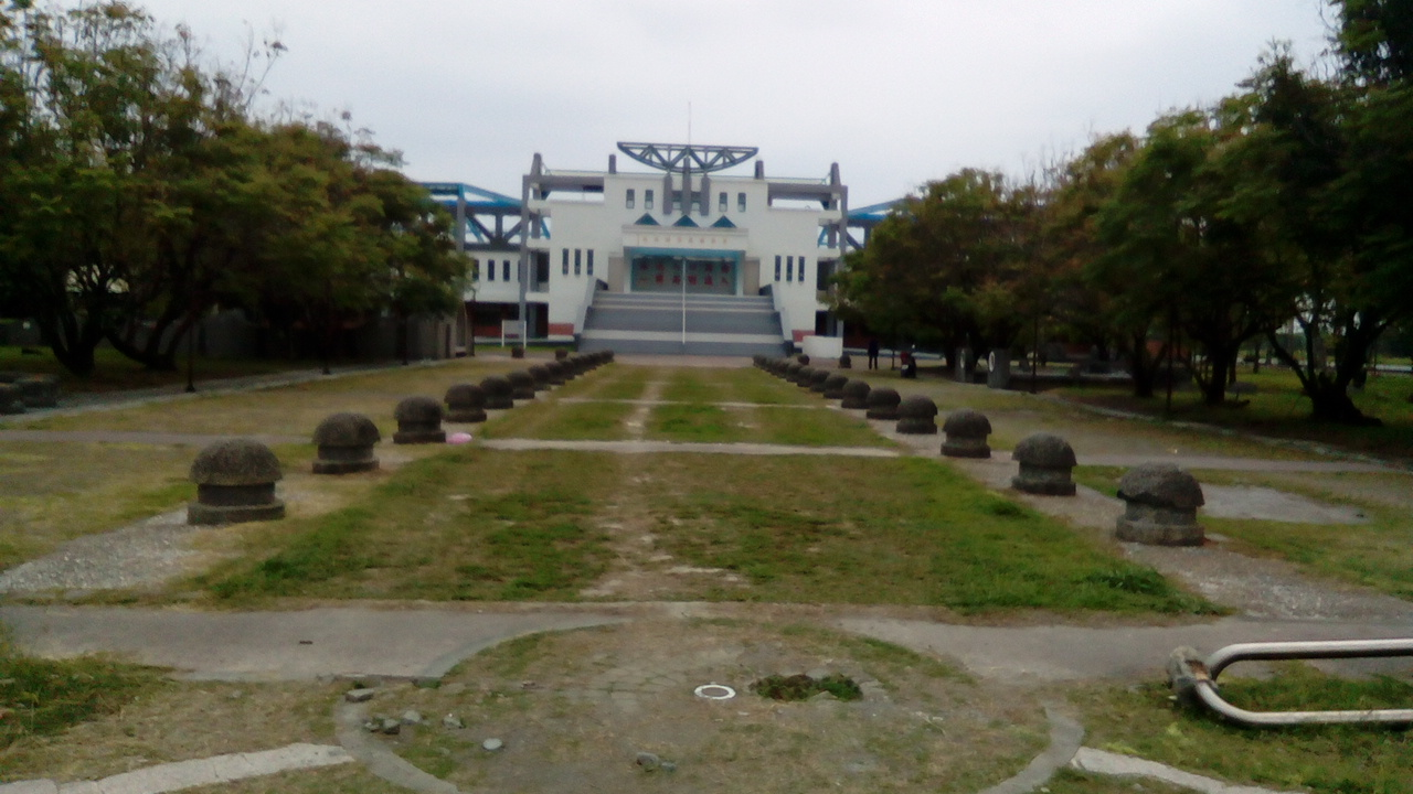 位於萬丹公園內 為鄉民練習游泳及消暑的好去處 啟用十餘年首度進行外貌整建作業 使建物看起來更美輪美奐